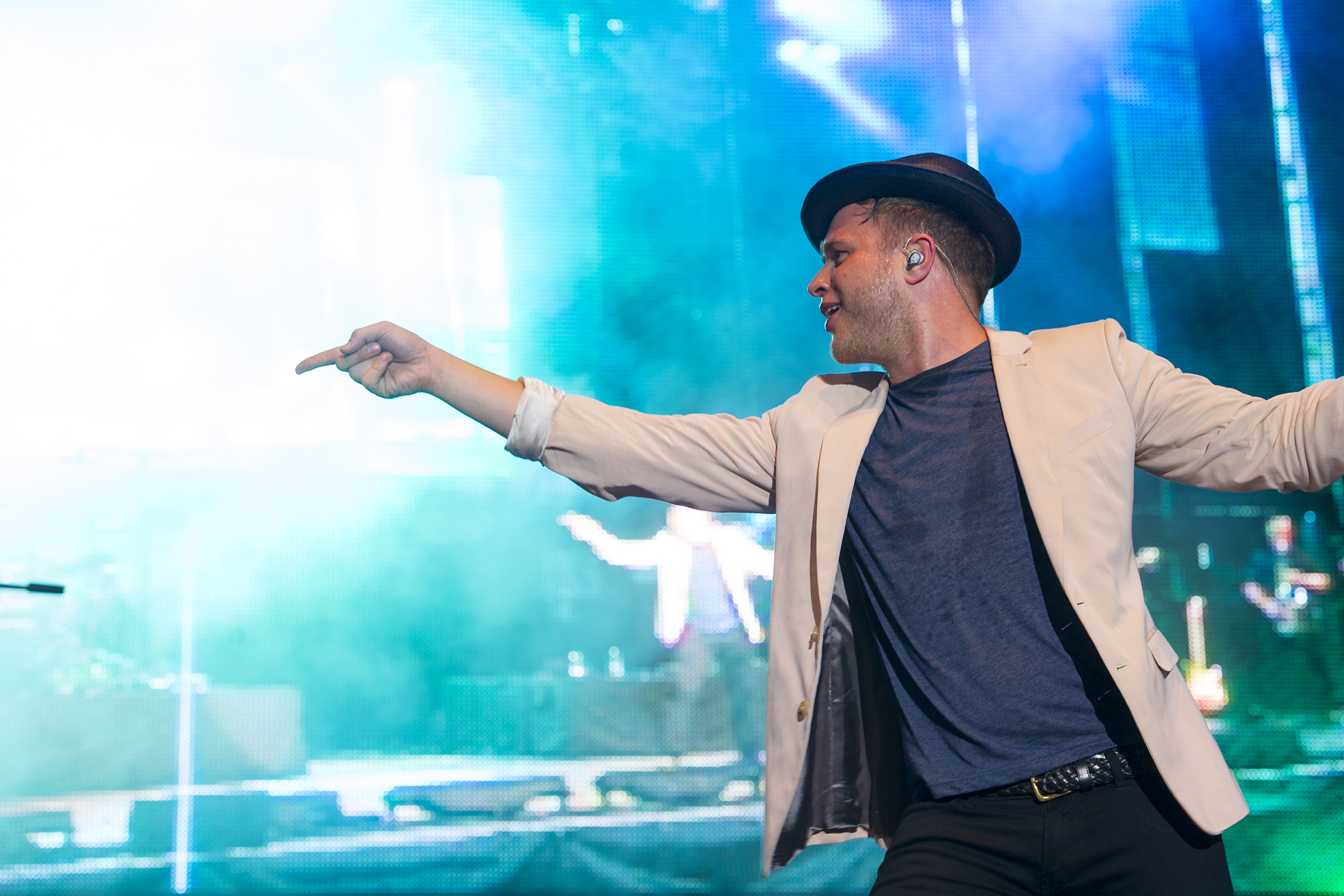 GIBRALTAR MUSIC FESTIVAL 2013 - OLLY MURS